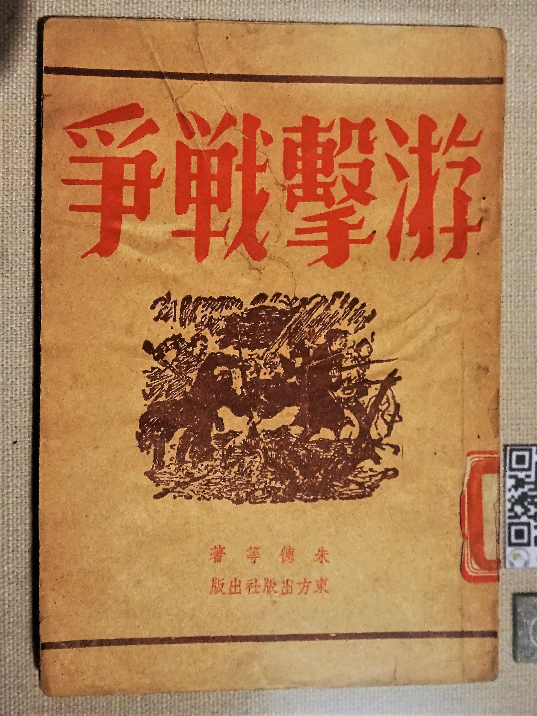 中文（中国大陆）: 1938年11月朱德等著《游击战争》